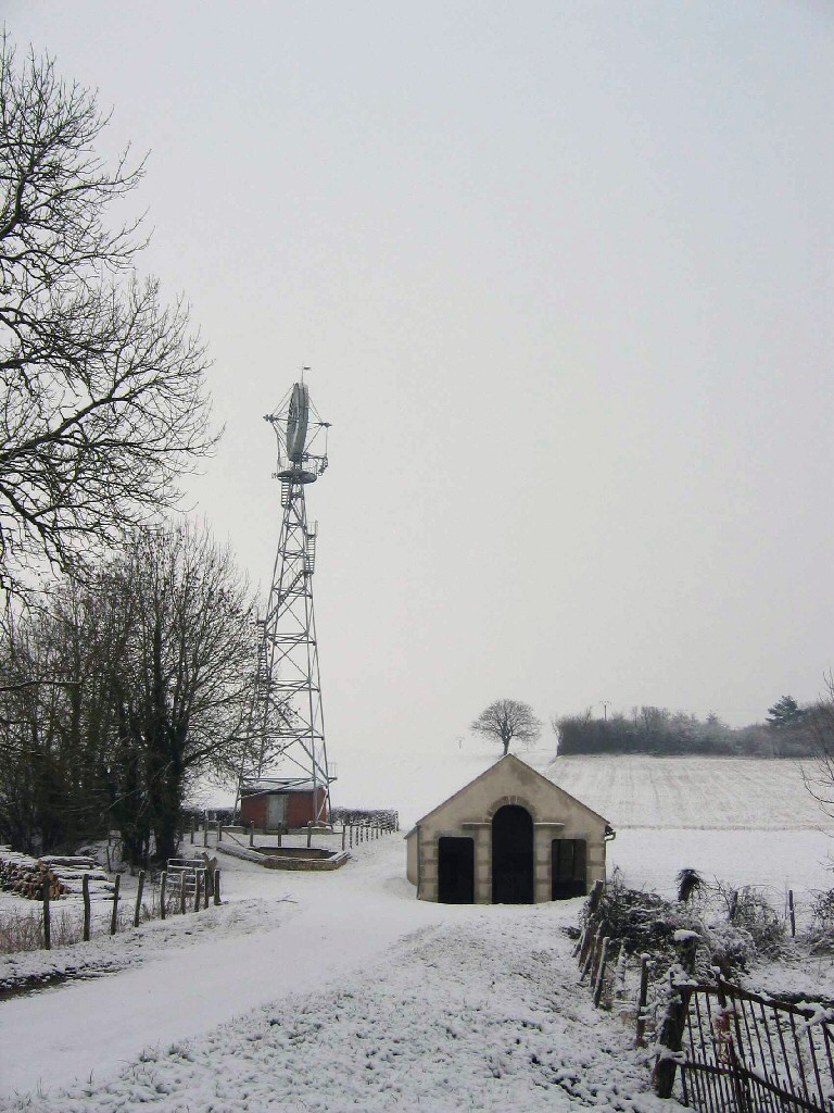 éolienne et lavoir de Vignol (Nièvre) sous la neige